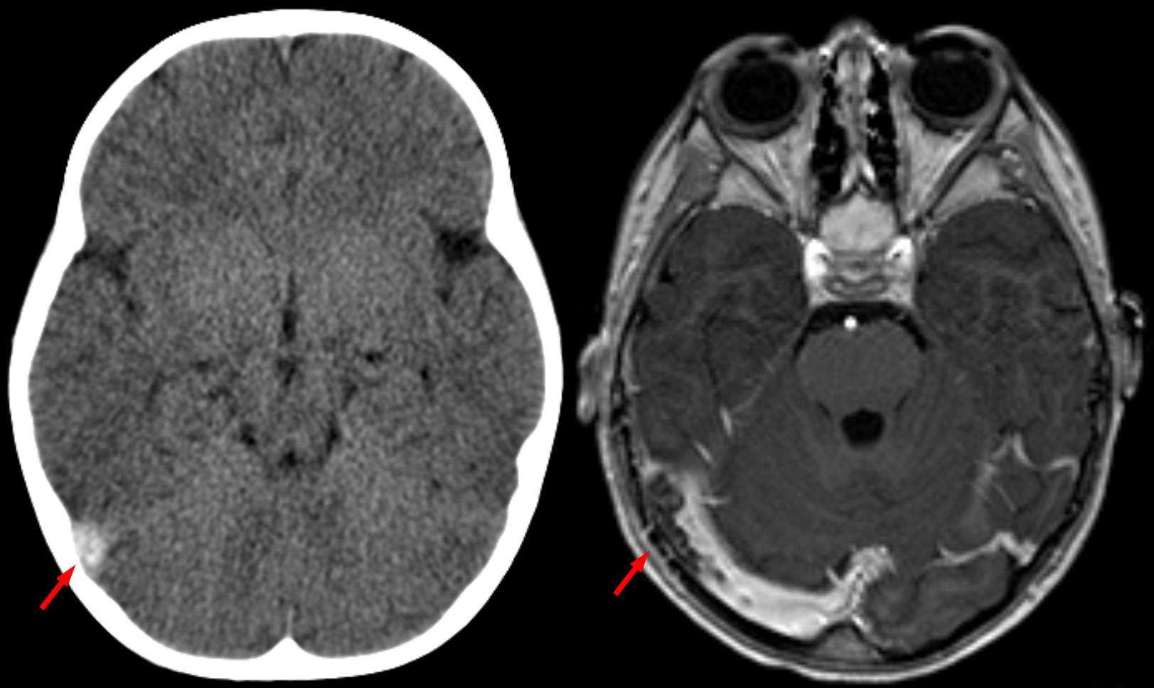 Sinusvenenthrombose in der Computertomographie ohne Kontrastmittel (links) und in der Kernspintomographie T1 mit Kontrastmittel (rechts) gleicher Fall.